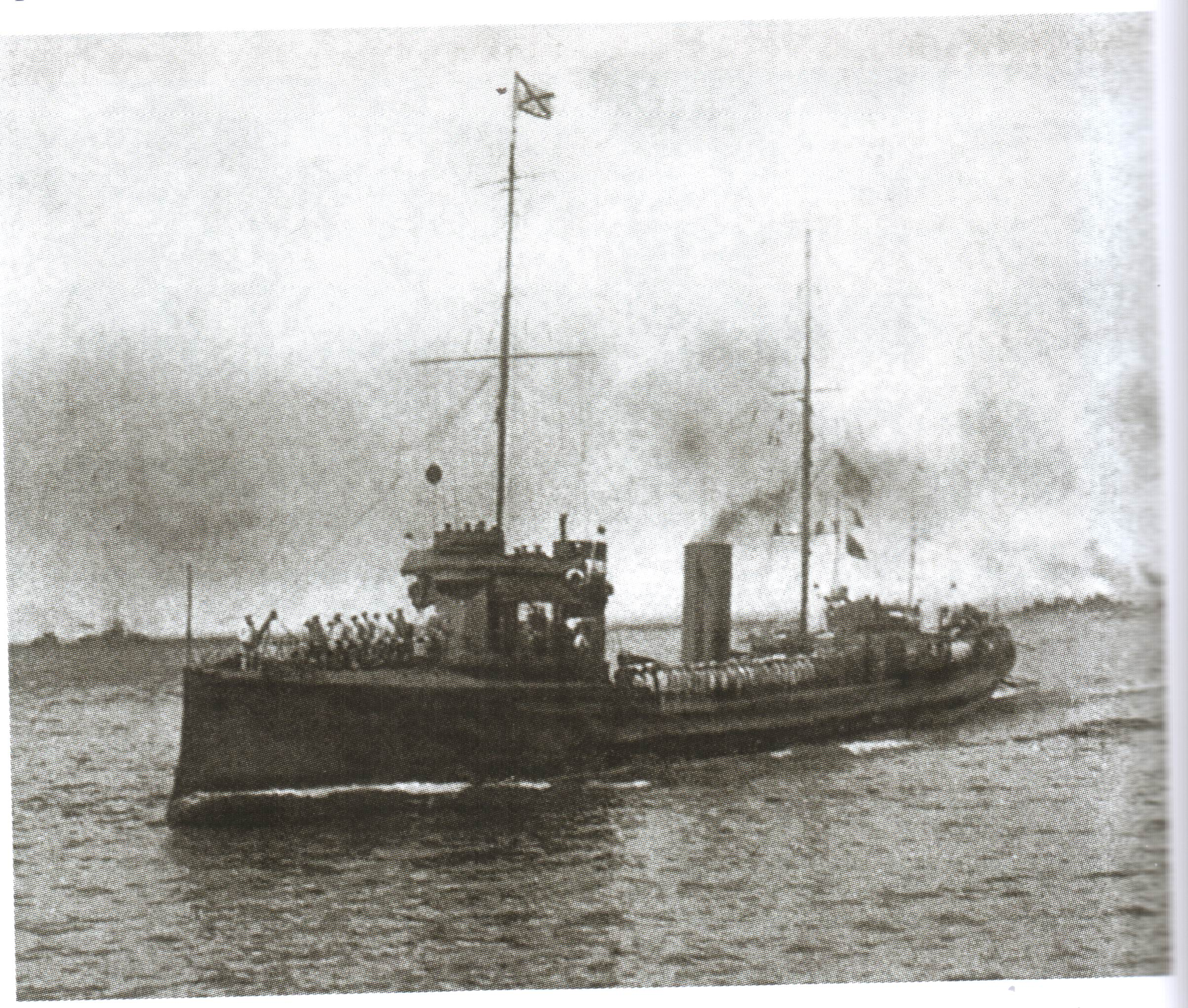 Эсминец "Сибирский стрелок" -- флагманский корабль командира бригады миноносцев А.В. Колчака. 1915 г.